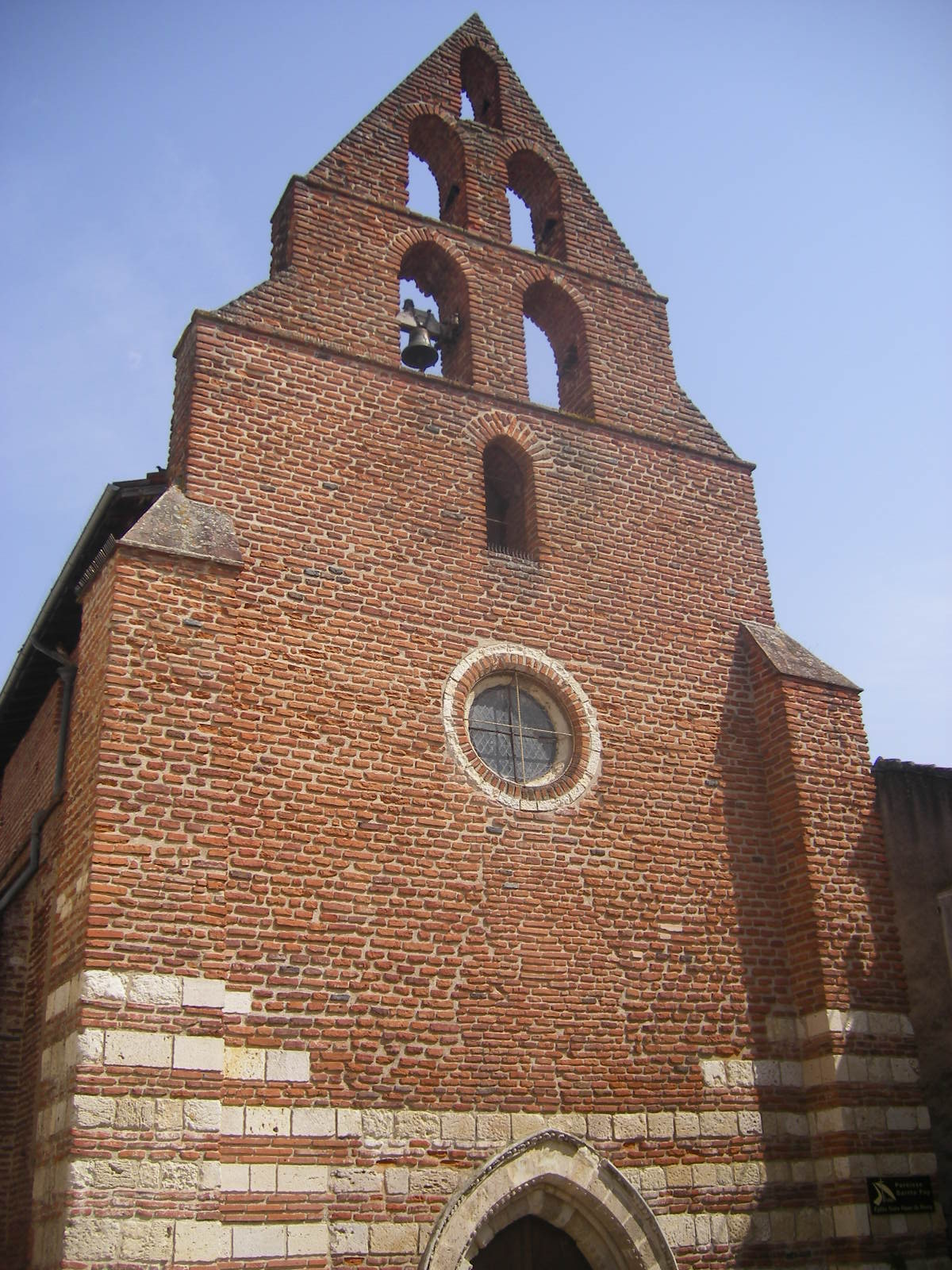 Église Notre-Dame du Bourg d'Agen